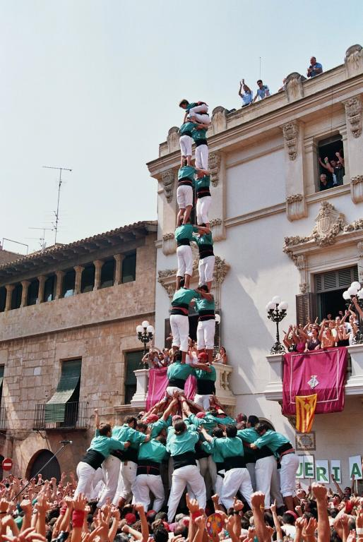 Torre de 9 amb folre dels Castellers de Vilafranca. Diada de Sant Fèlix 2005.